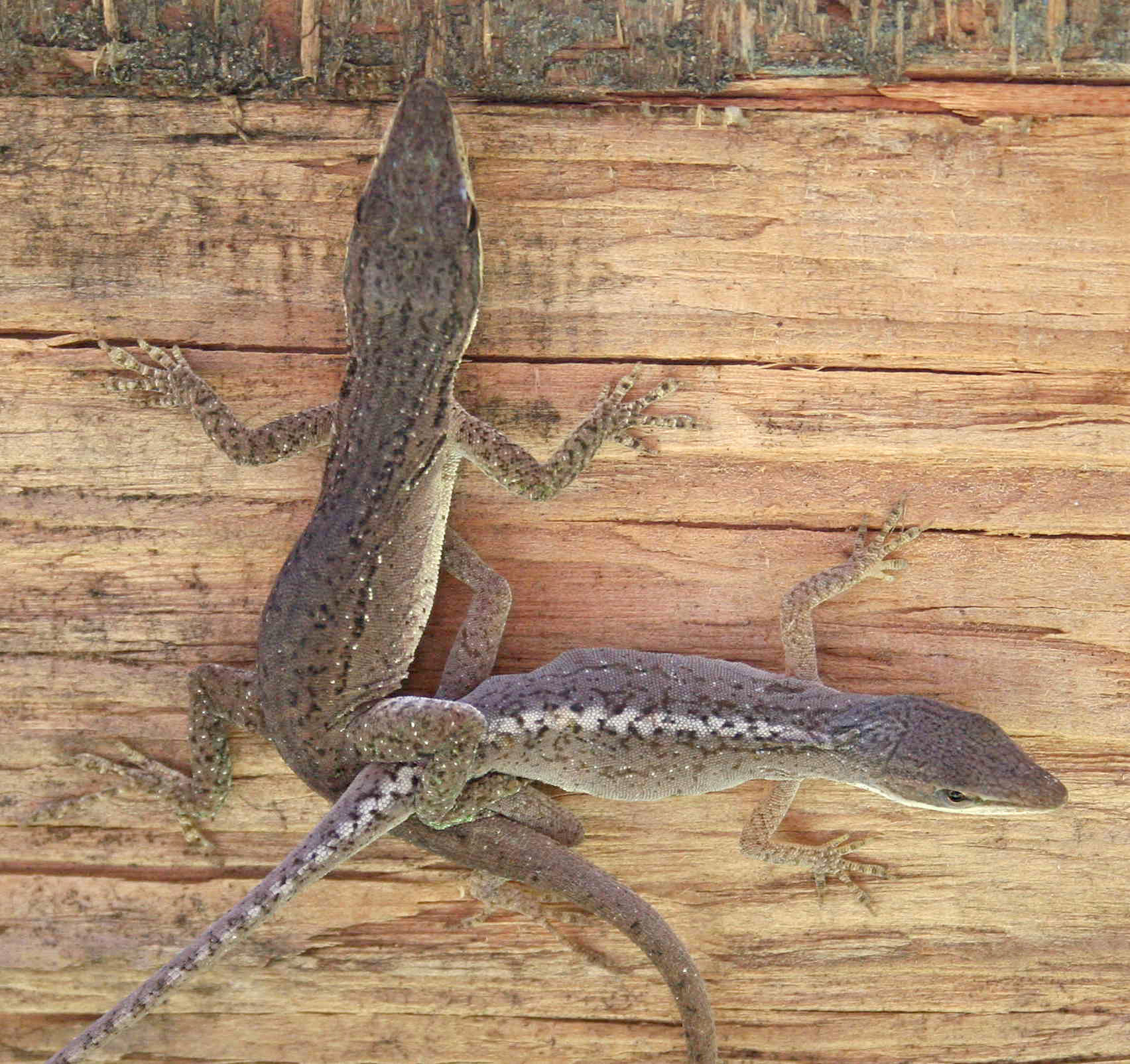 Anole Mating (Taken in Gainesville, FL)